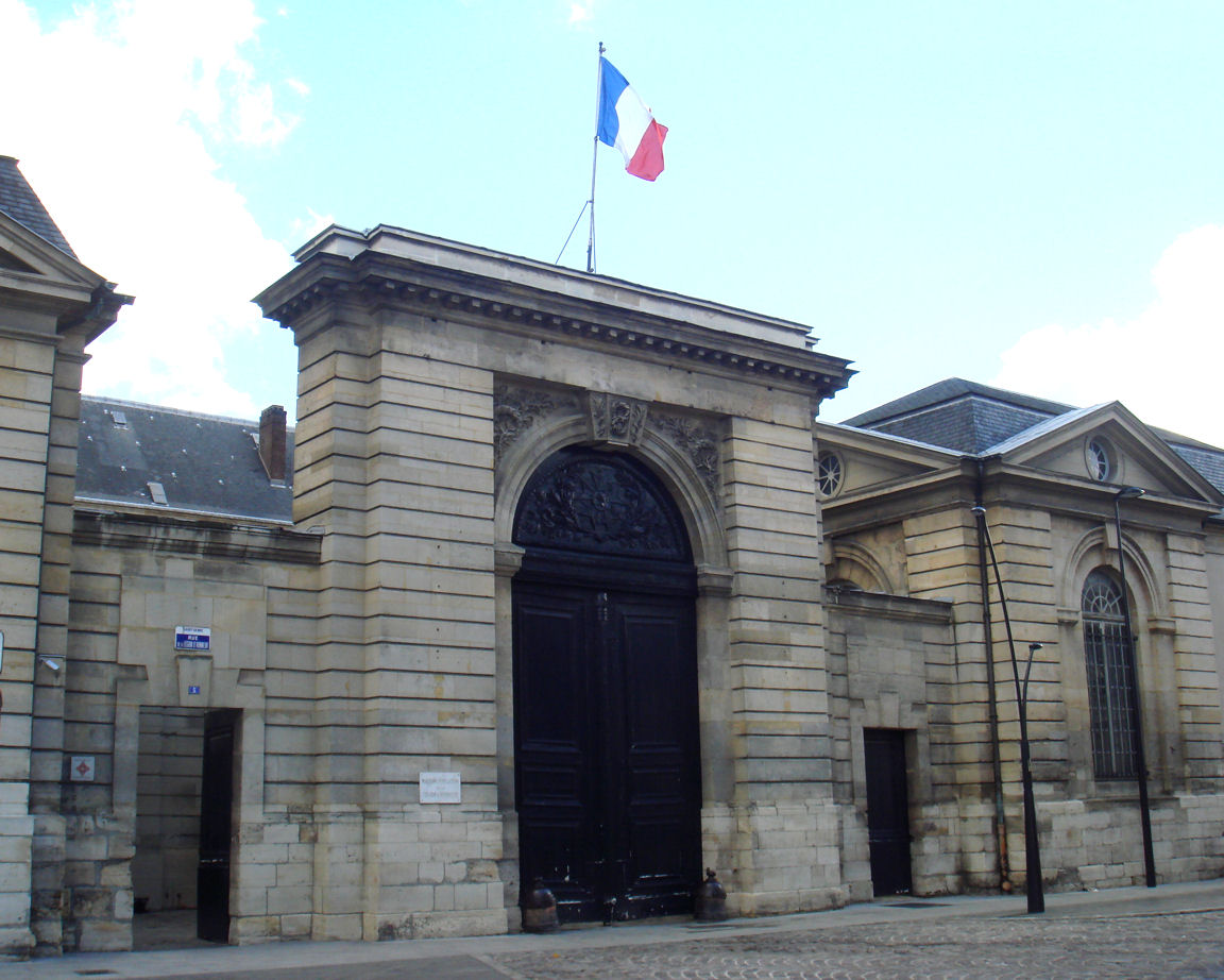 Maison_d'Education_de_la_Legion_d'Honneur de Saint-Denis